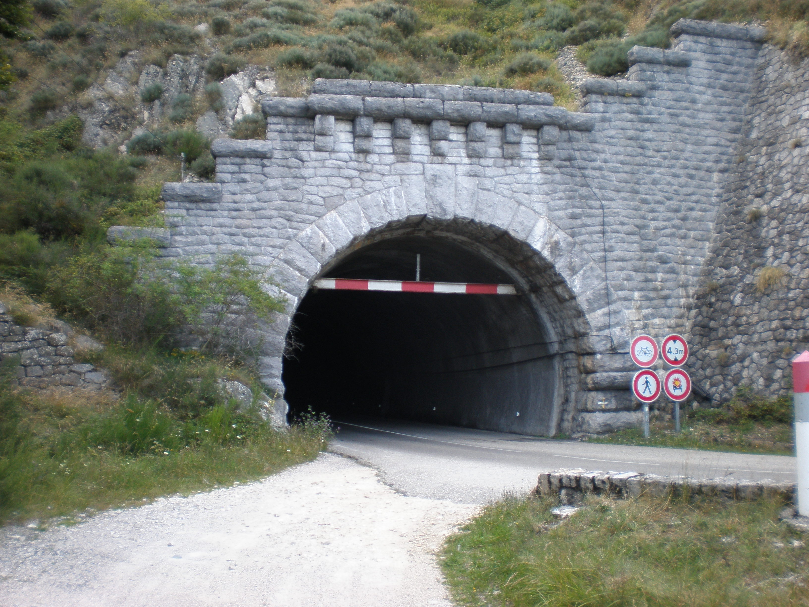 Le tunnel du Roux (Ardèche), entrée côté Le Roux